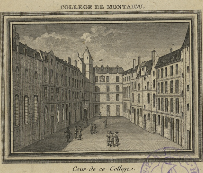 Collège de Montaigu gravure XVIIIè